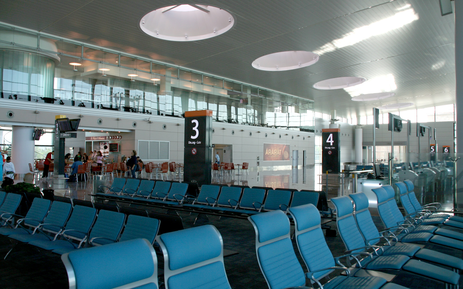 Hall de départs à l'aéroport Zvartnots de Erevan